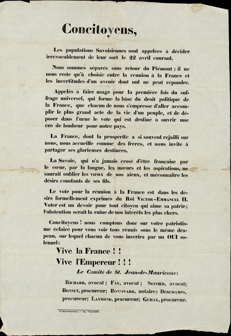 Appel du Comité de Saint-Jean-de-Maurienne. Savoie; Annexion : comité de St Jean-de-Maurienne; Saint-Jean-de-Maurienne